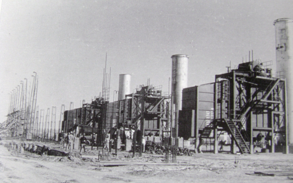 Comienzo de las Obras del Coplejo Gral. Cerri